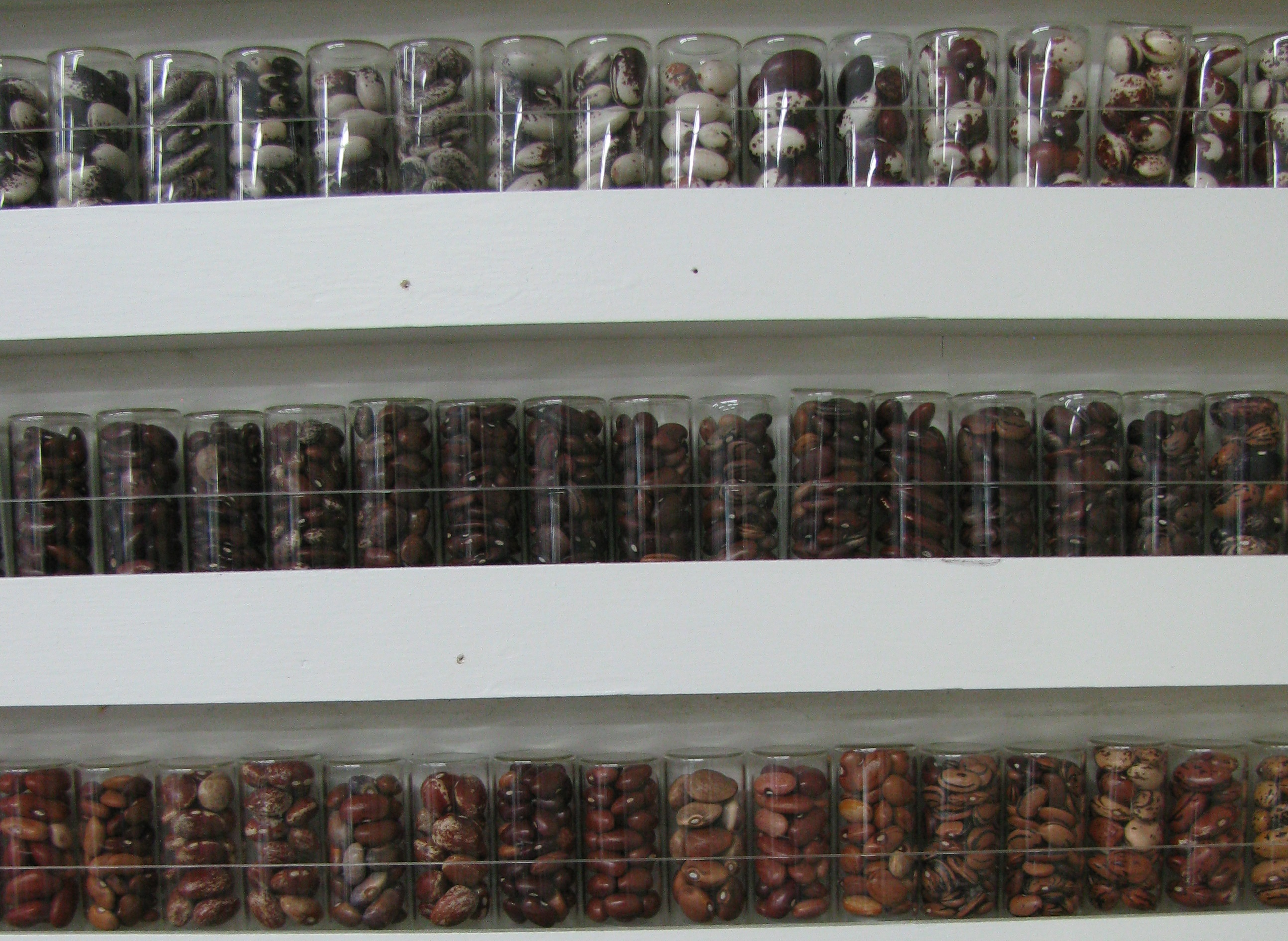 Banque de gènes au CIAT